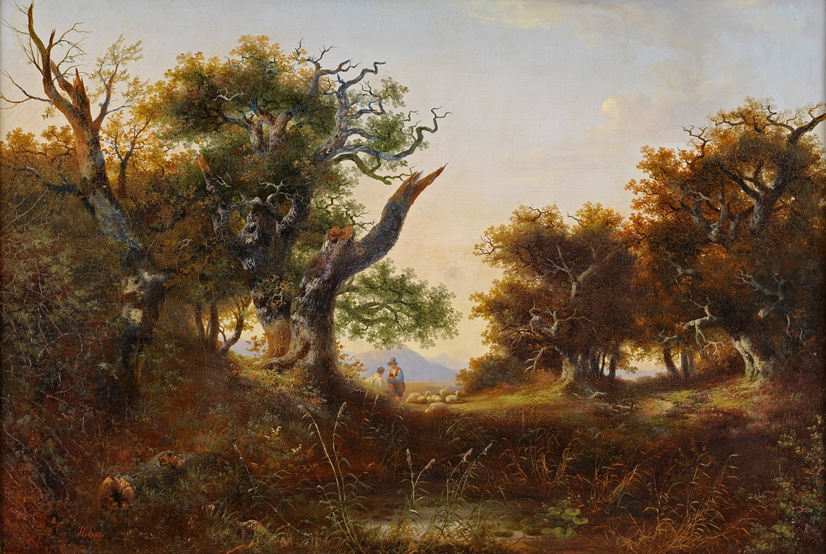 Pastorale. Signiert. Öl/Lwd., 65 x 95 cm.